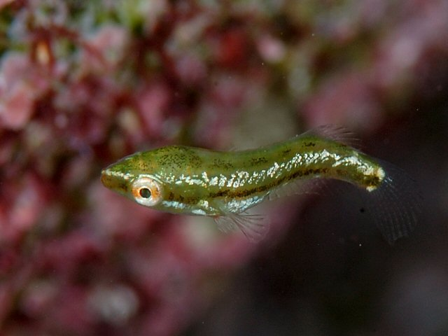 カミナリベラ Stethojulis interrupta terina